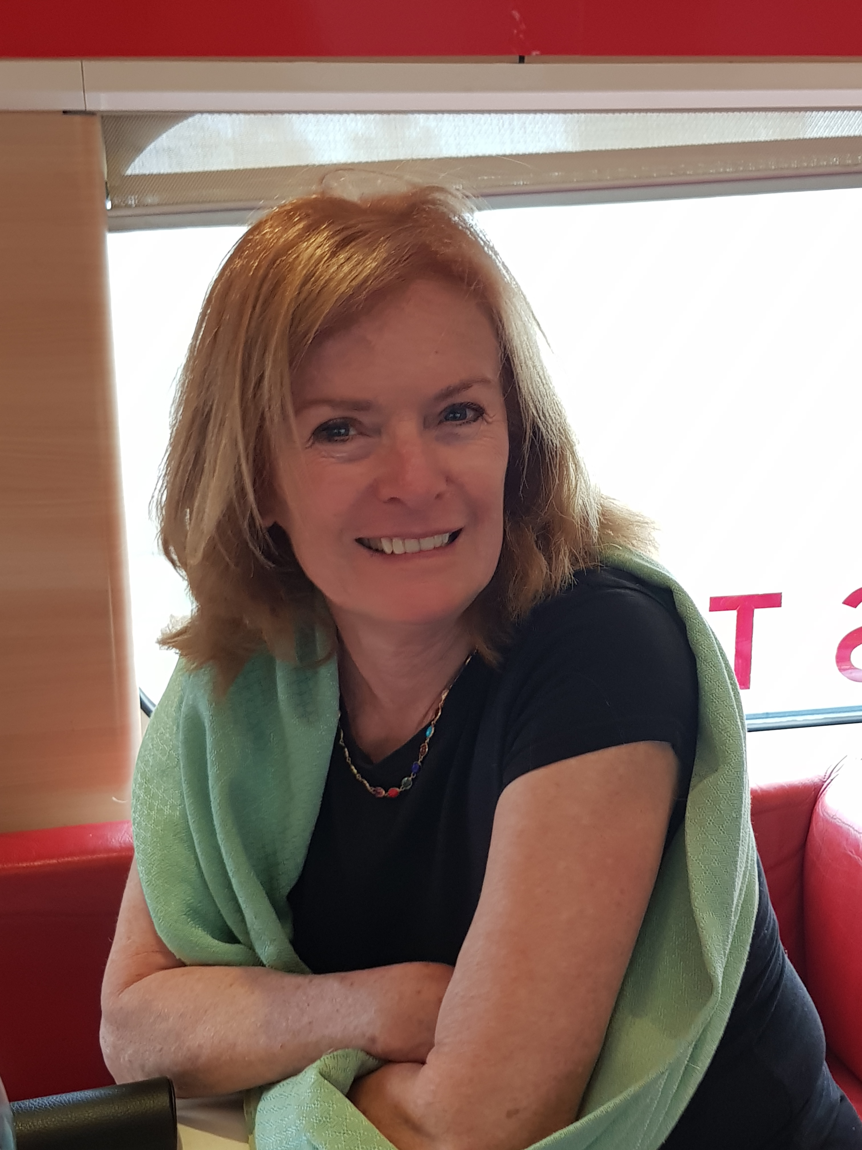 Författare från Frankrike